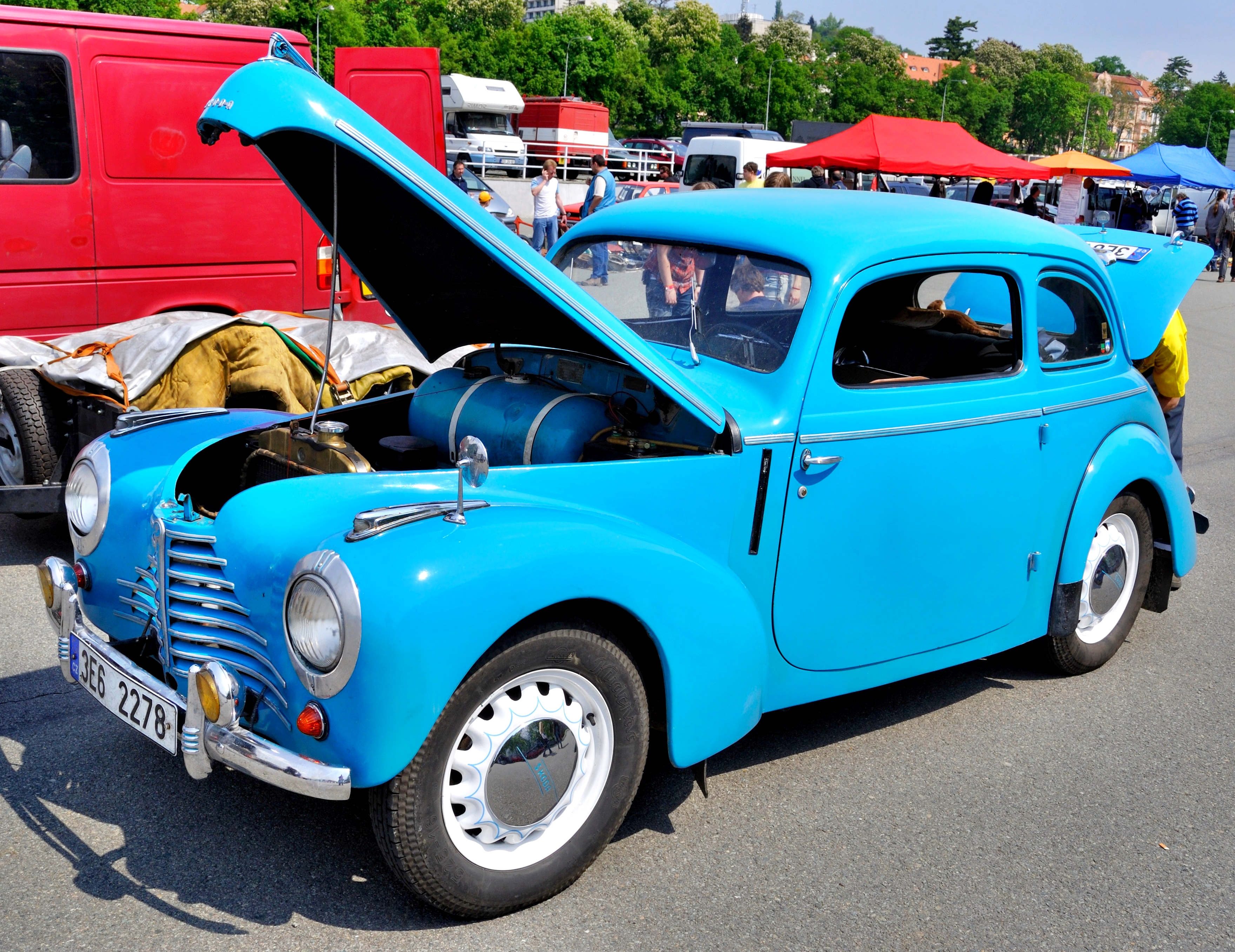 Škoda 1101 tudor